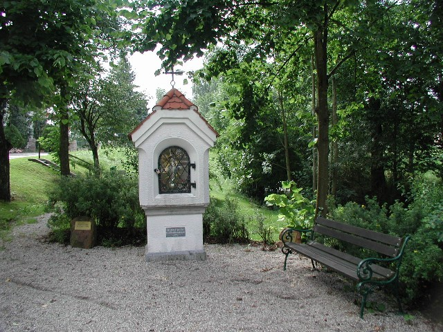 Place in Mettmach